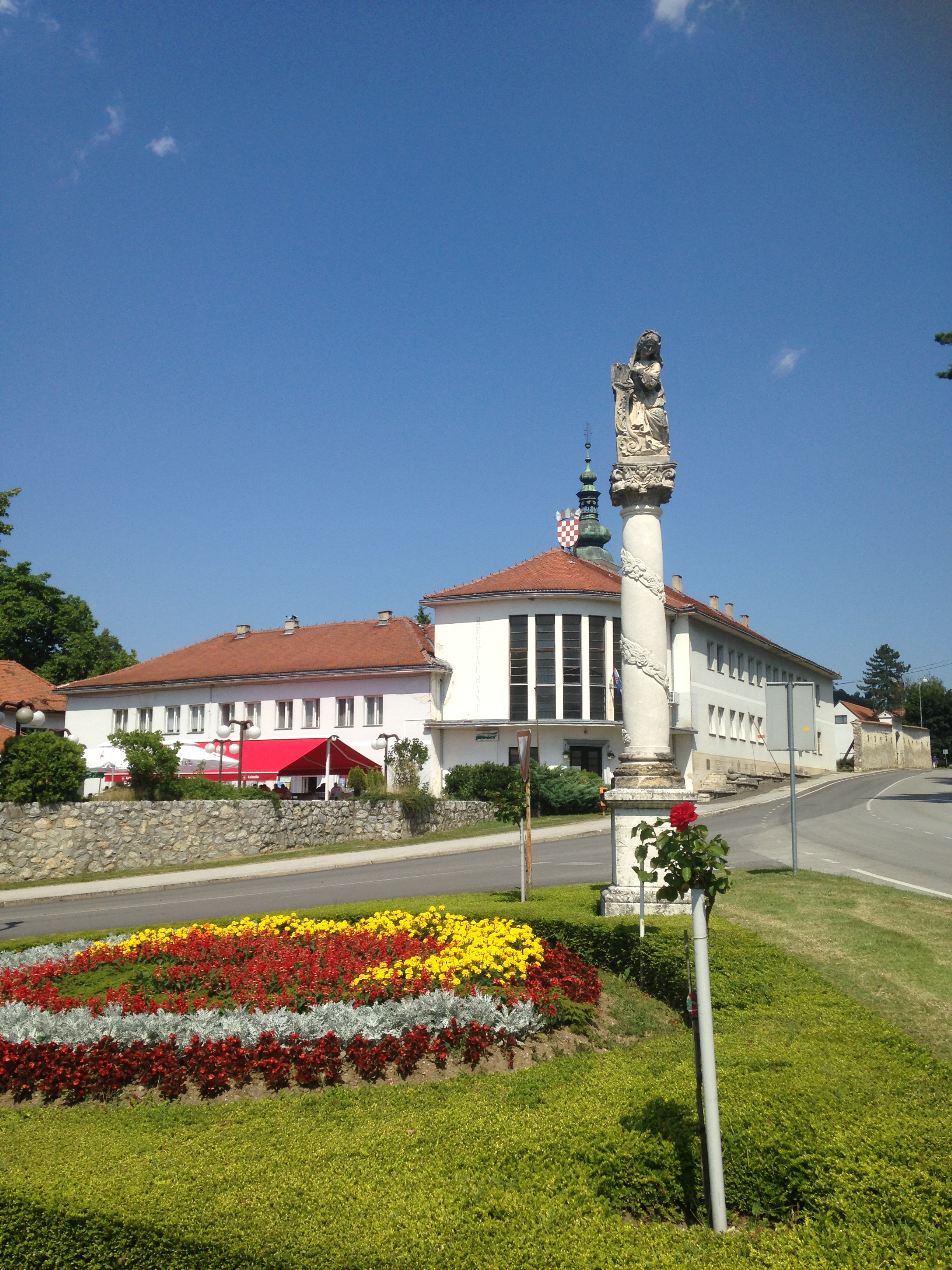 centar Lepoglave